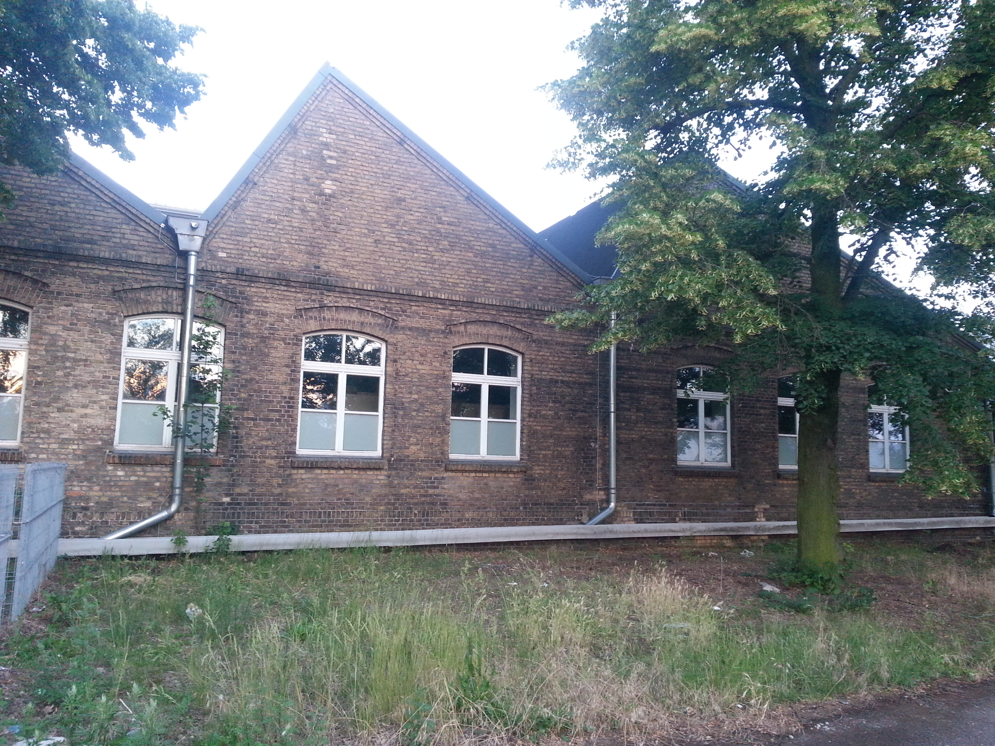 Denkmalgeschützte Lagerhalle in der Industriestraße 1b in Trebbin